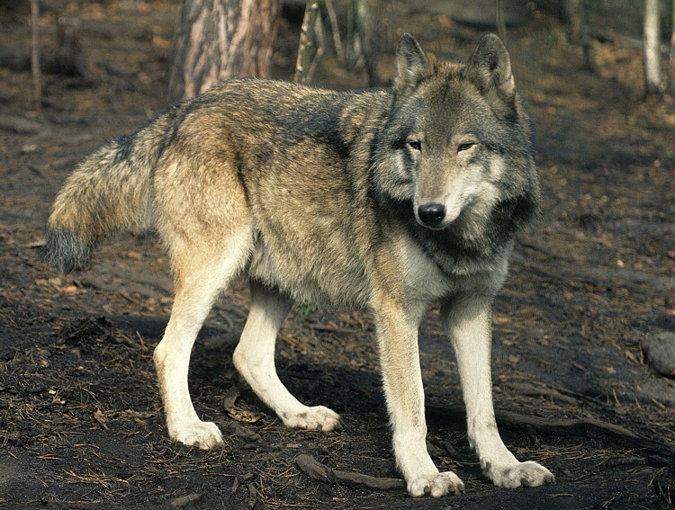 Canis-lupus